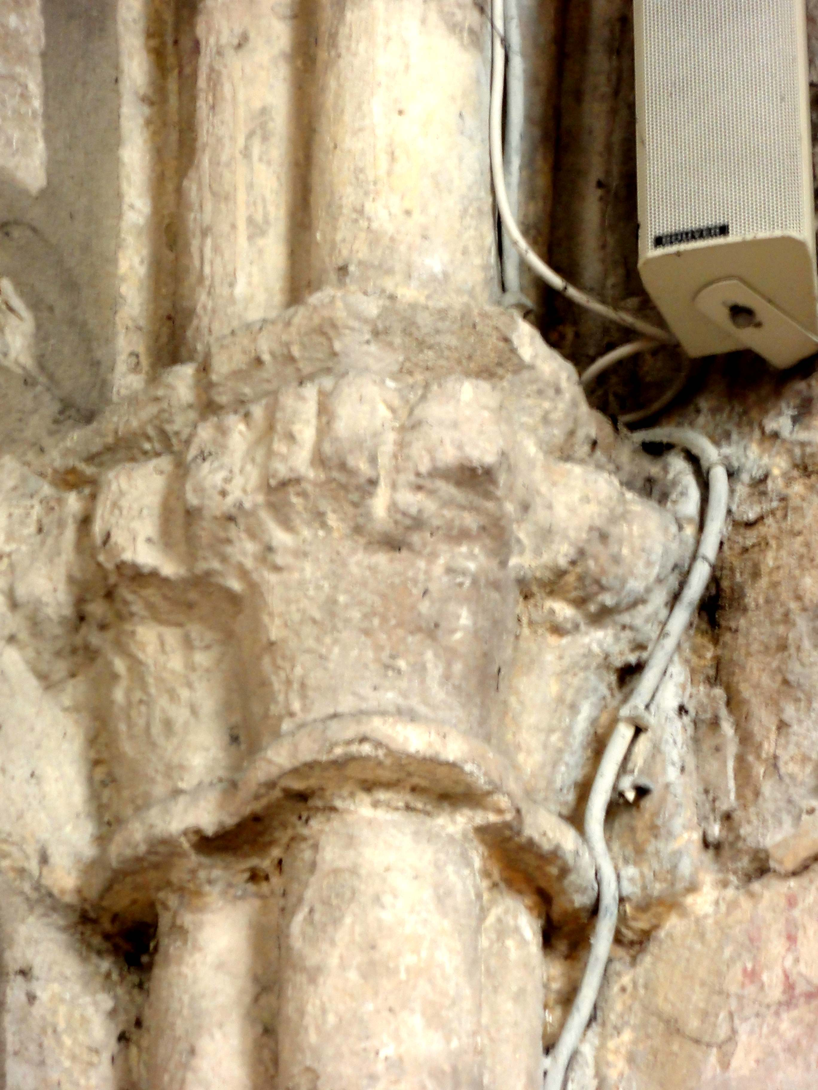 Chapiteau(x) de l'église - voir titre.